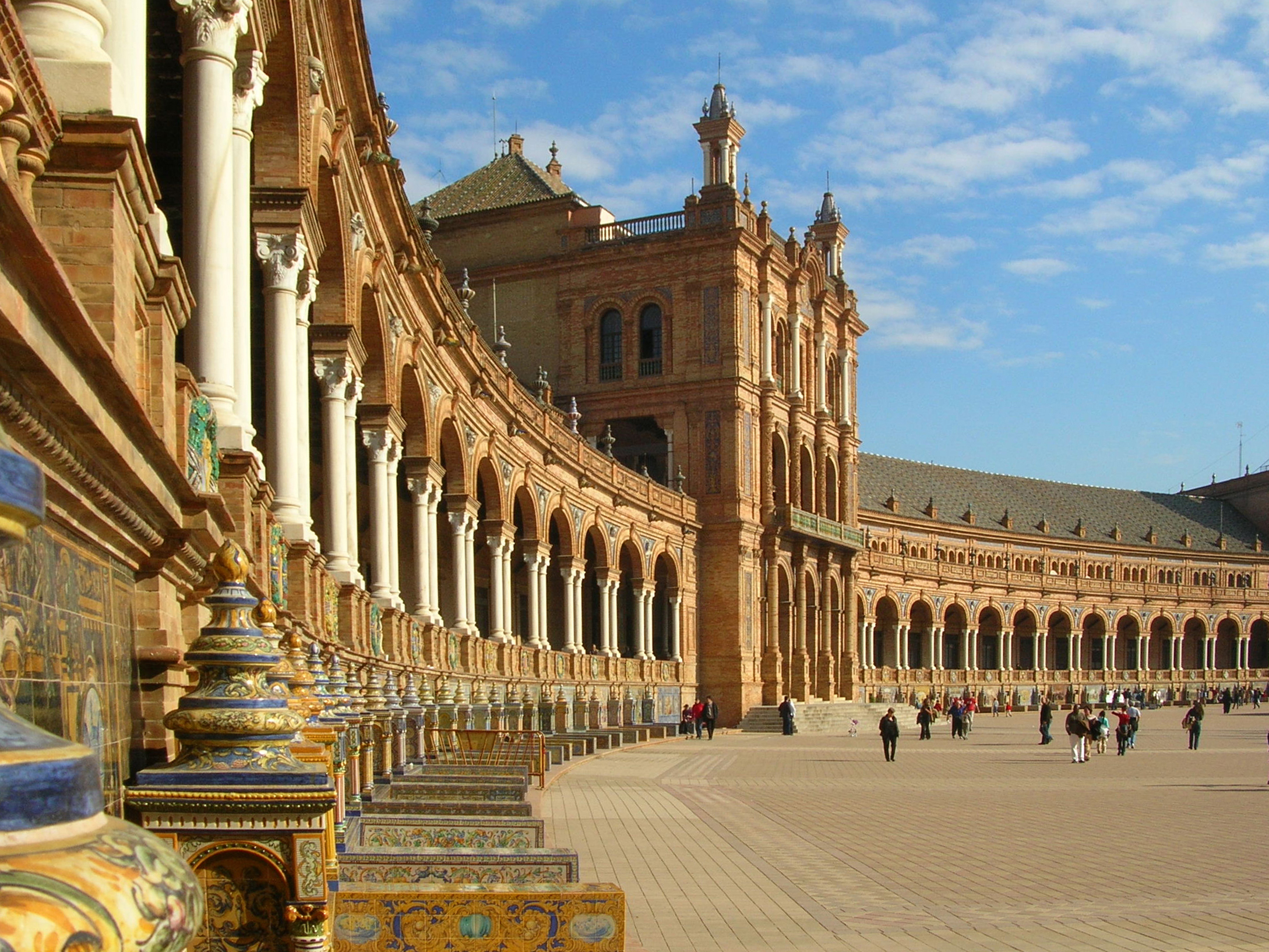 Place d'Espagne (Plaza de España) de Séville, Espagne